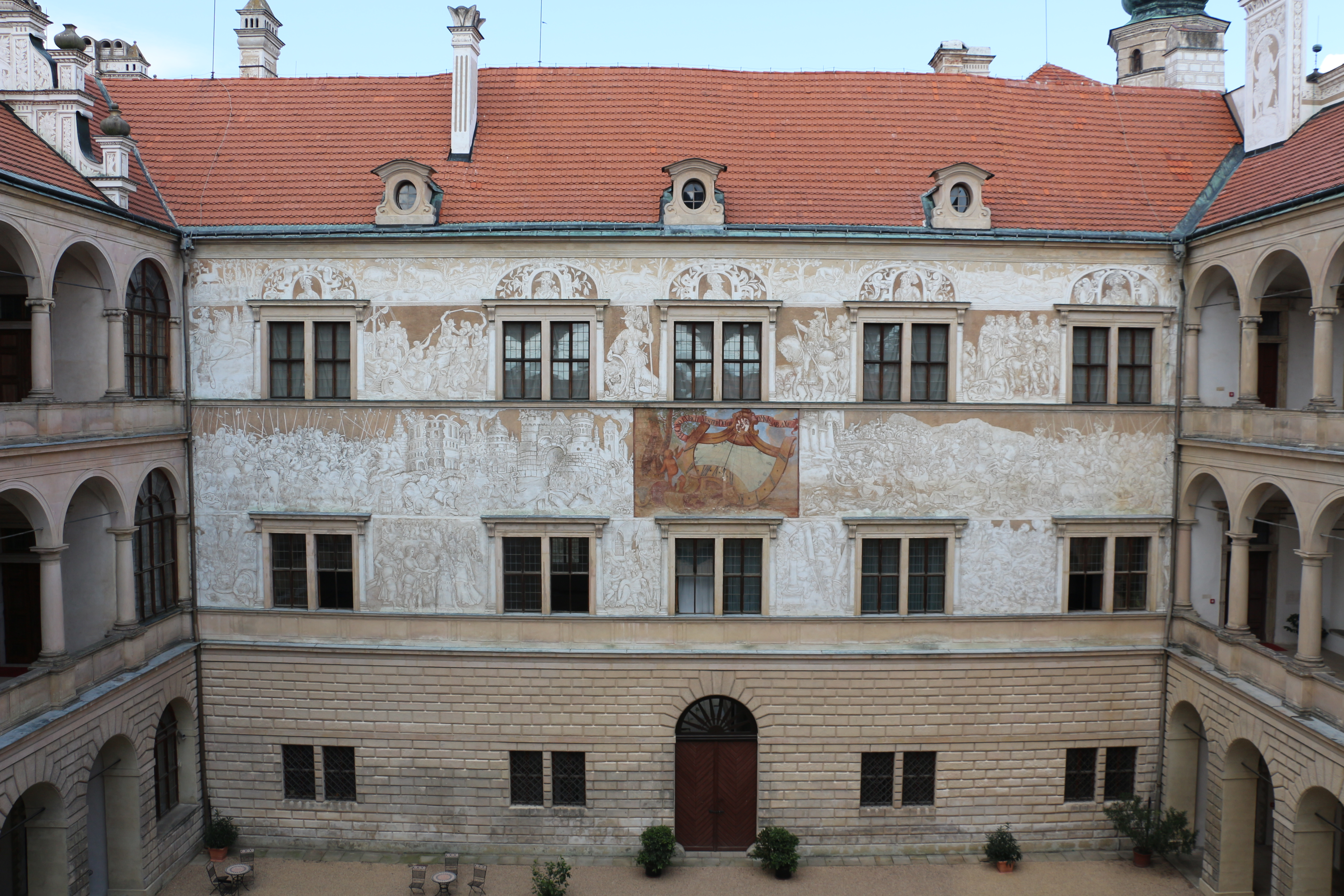 Zámek Litomyšl, Jiráskova 93, 94, 133, 134, Jiráskovo náměstí, Záhradí, Litomyšl.